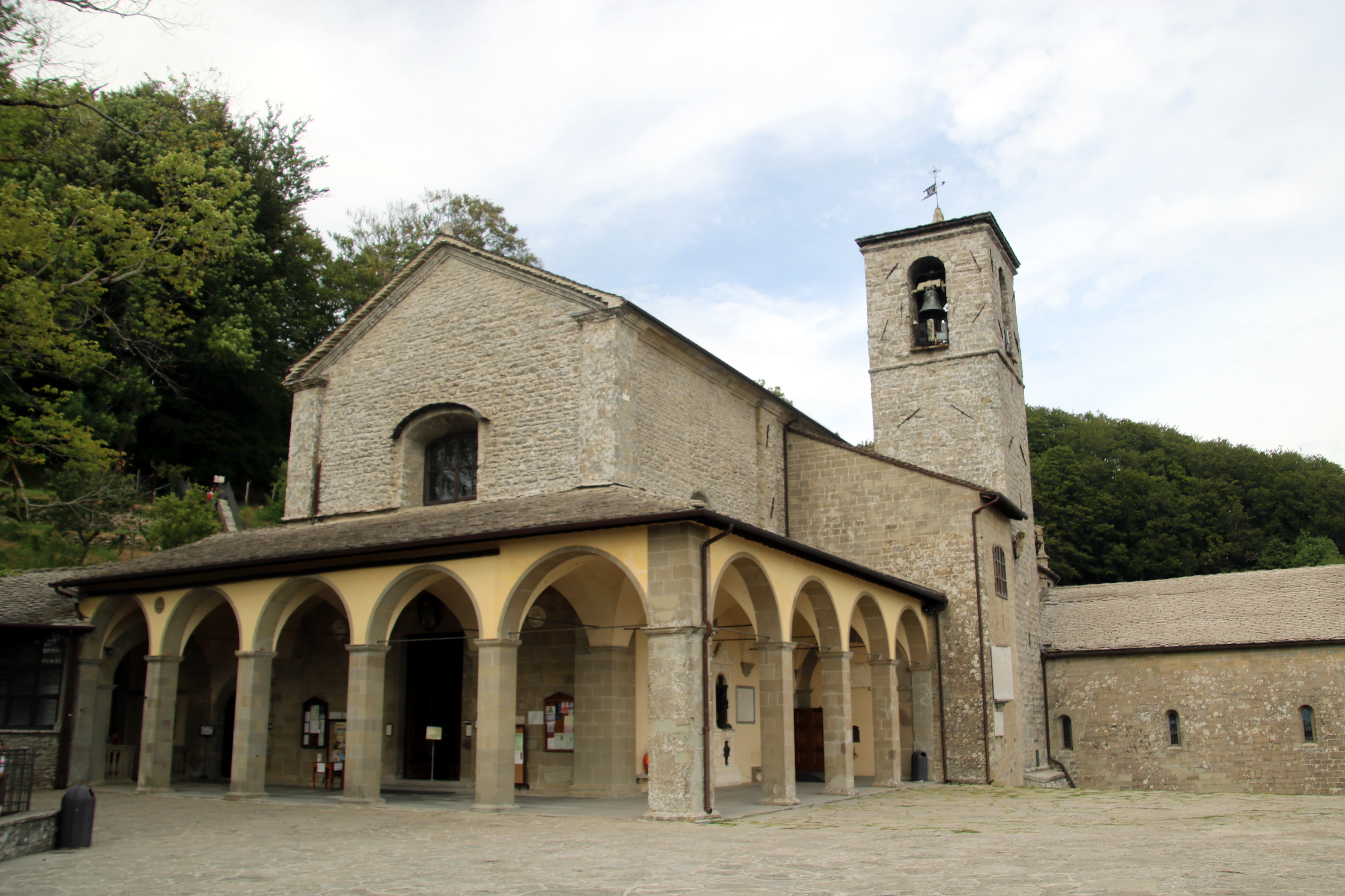 Via Ghibellina, Chiusi della Verna, Santuario della Verna